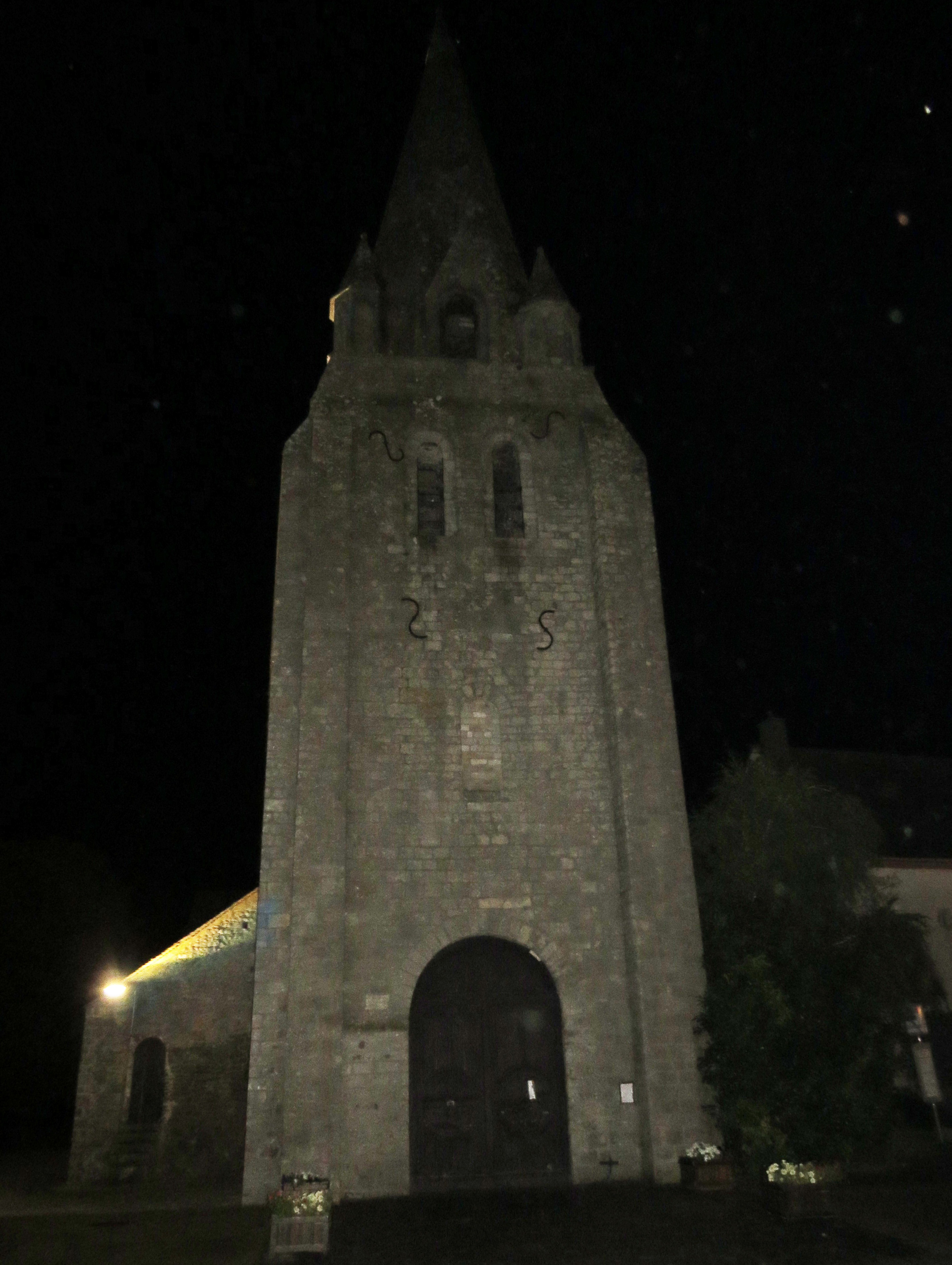 Église Saint-Georges de Mareau-aux-Bois (ClasséInscrit) .